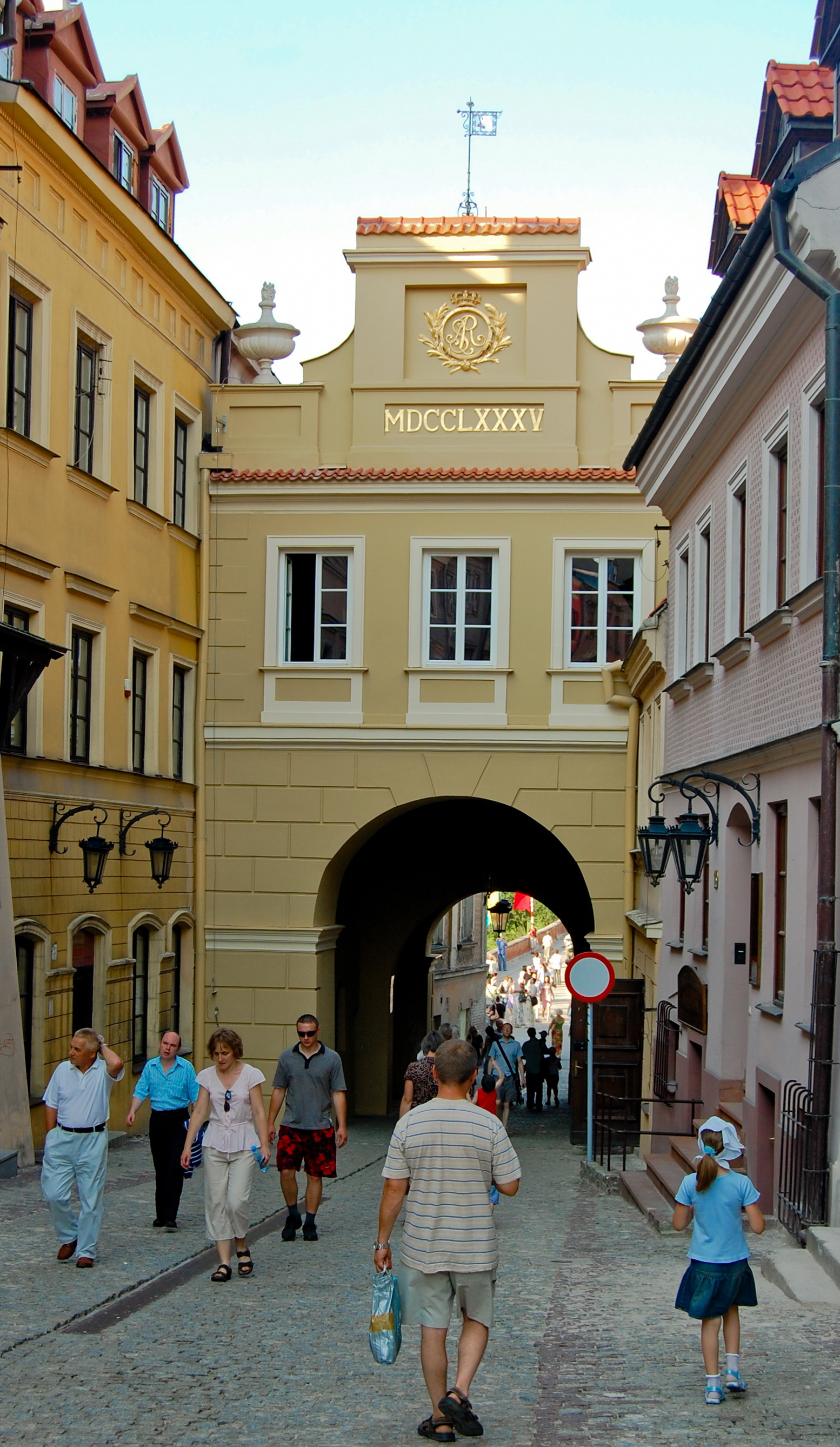 Brama Grodzka w Lublinie podczas obchodów 440. rocznicy Unii Lubelskiej.